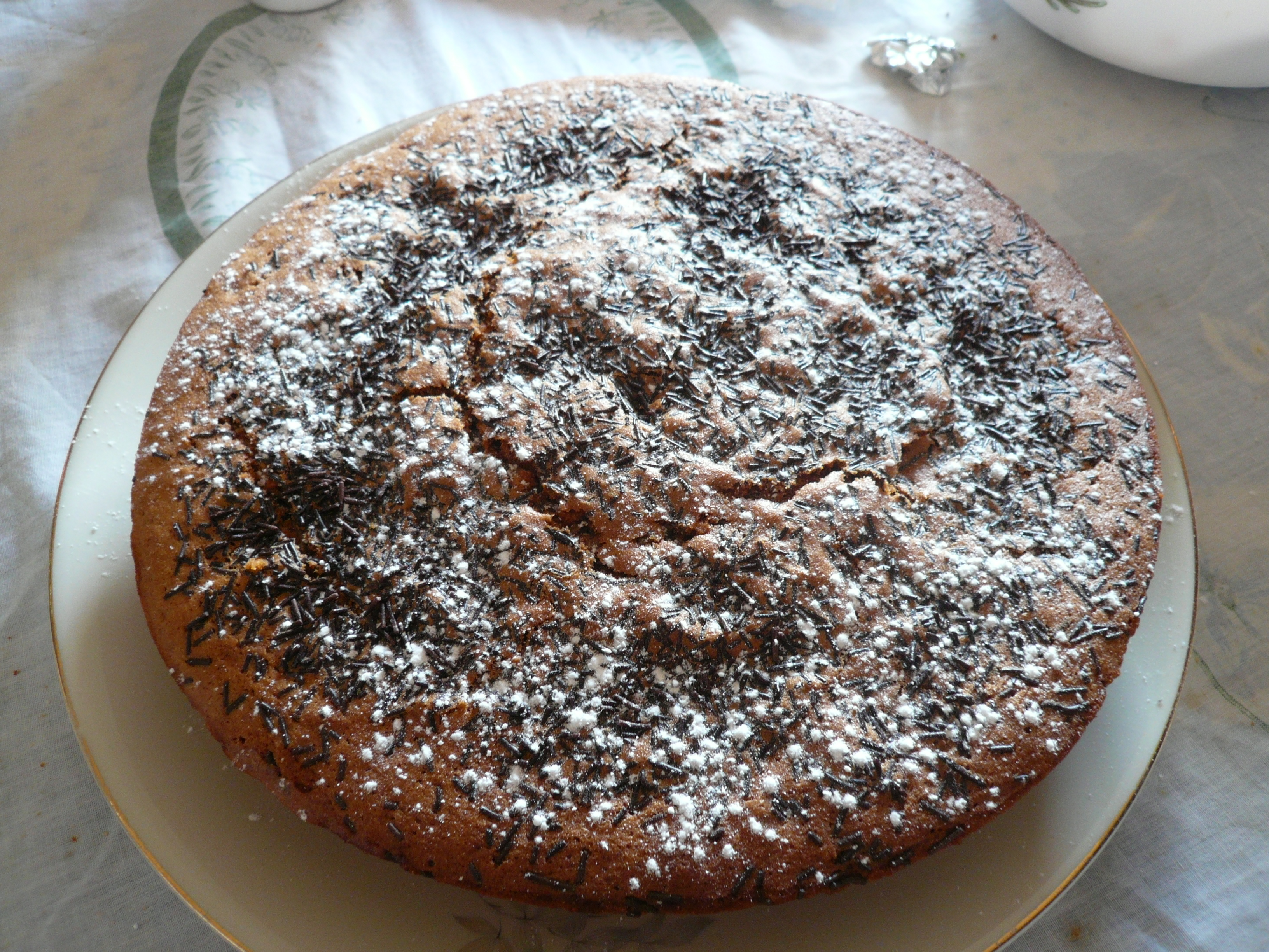 torta di pan di Spagna. Autore foto: Roberto De Martino